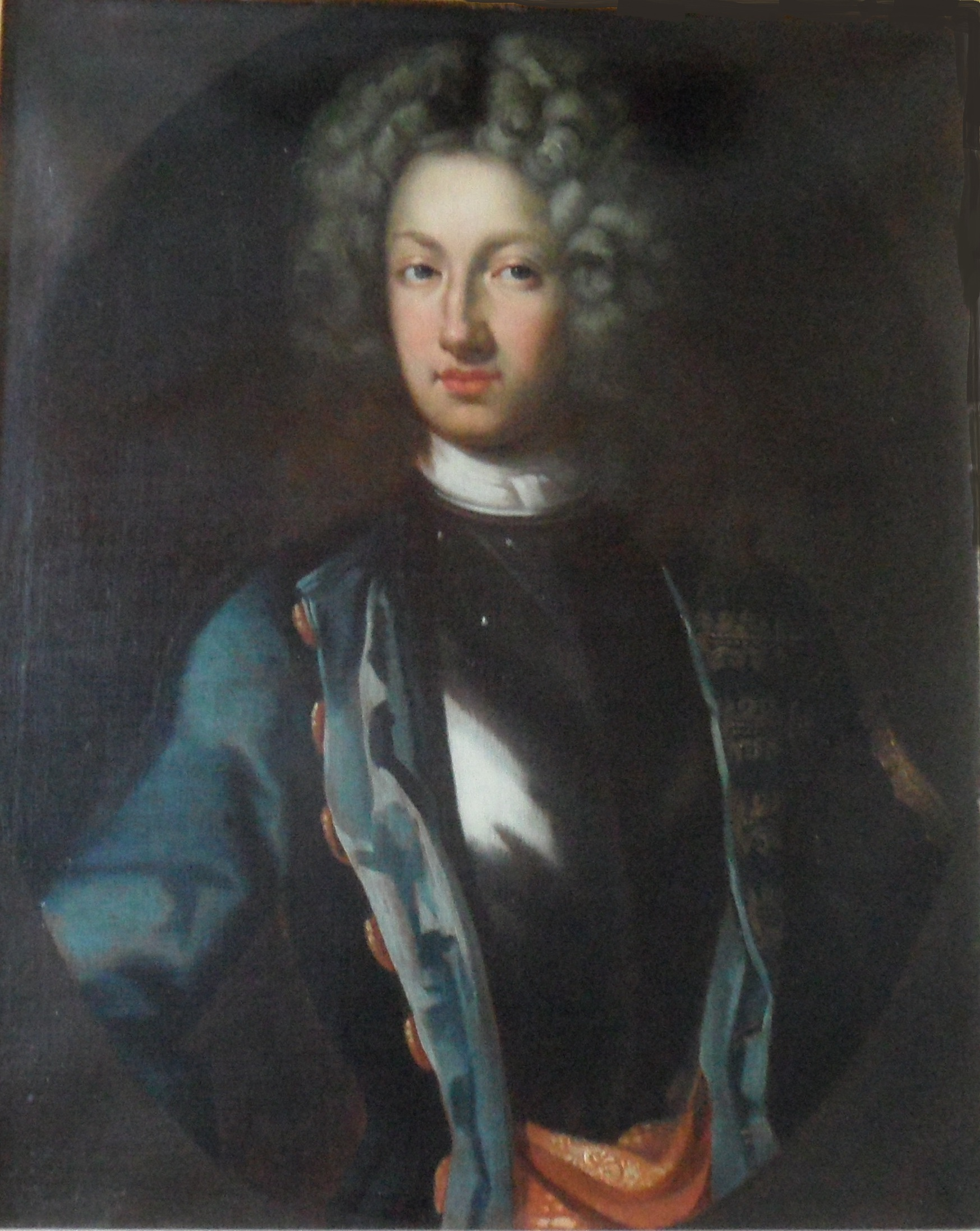 Schering Rosenhane (1685-1738)